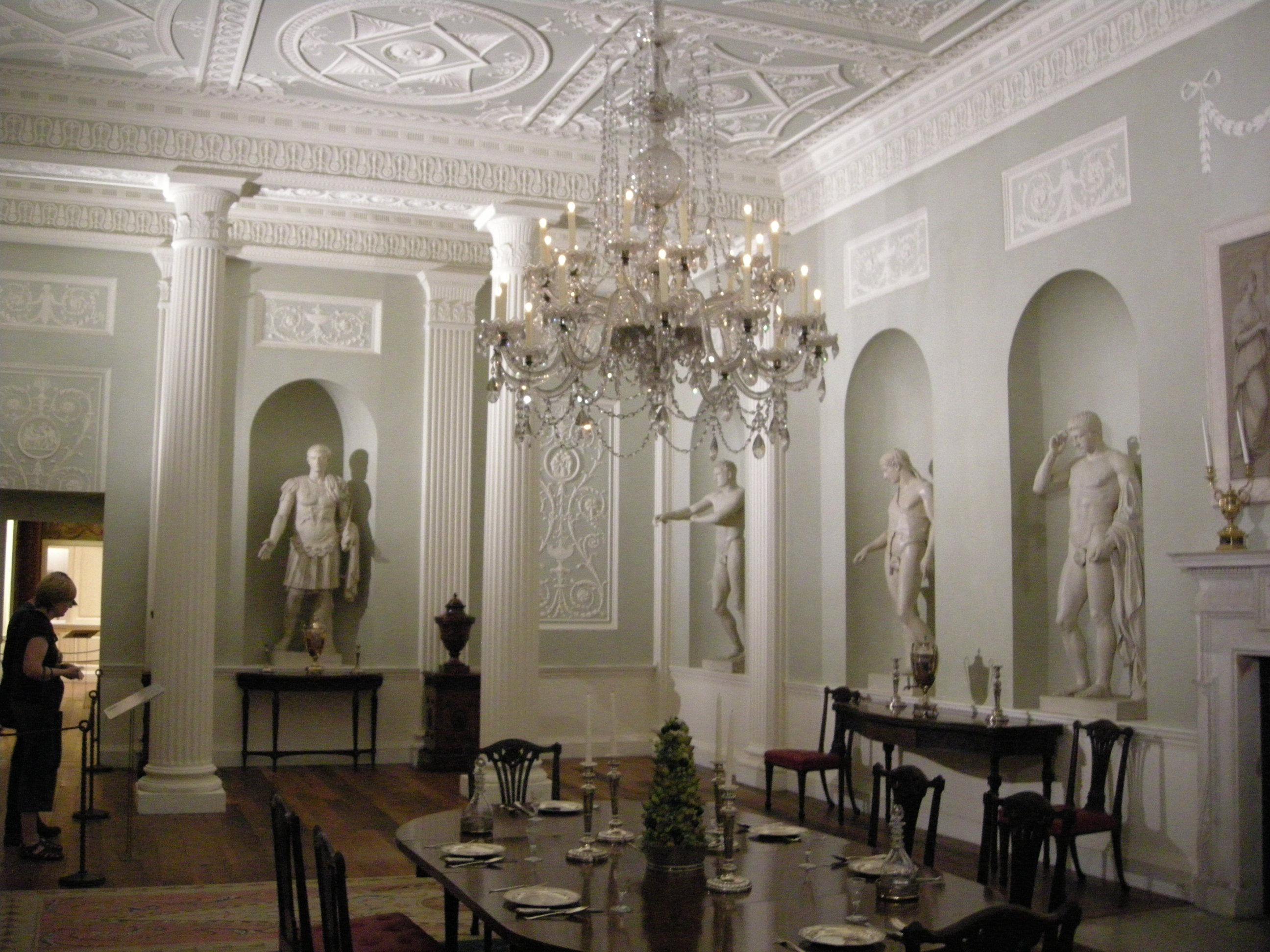 Met, sala di adam